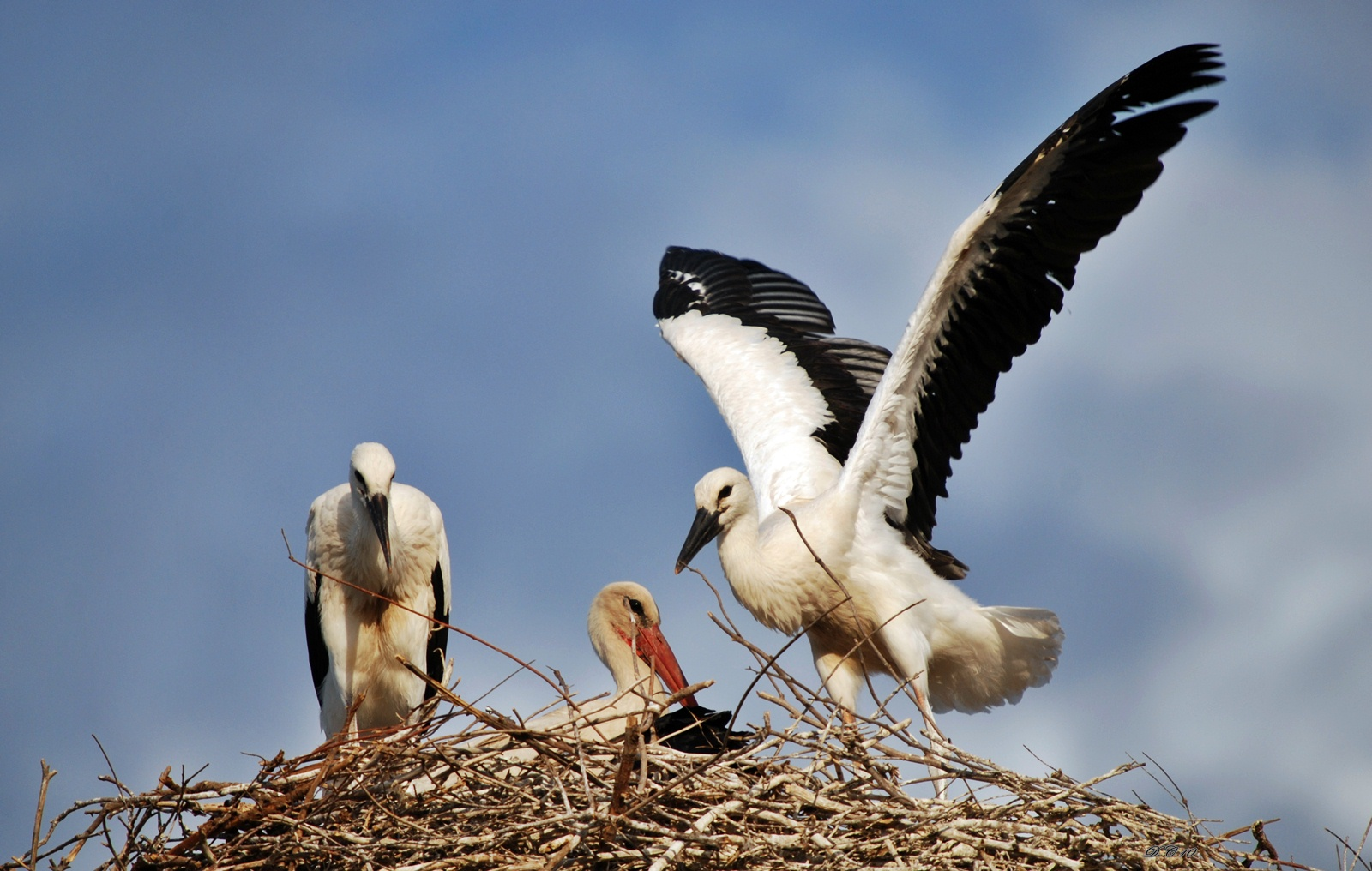 Kurdî: Leglega spî û çêlikên wê.